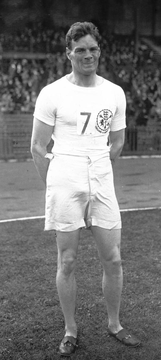 Colombes : match d'athlétisme France Angleterre : Butler (anglais) gagnant du 200 m. (portrait) : [photographie de presse] / Agence Meurisse